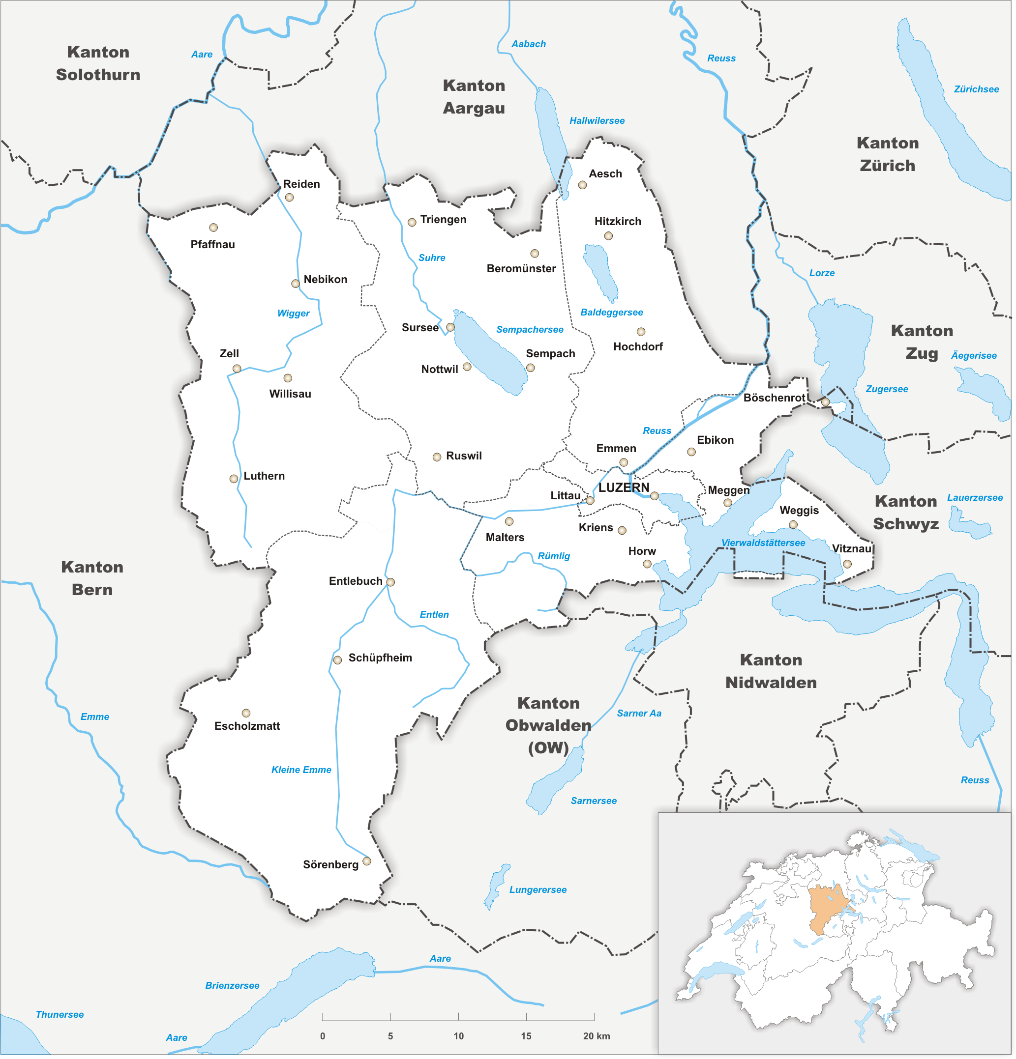 Karte des Kanton Luzern.